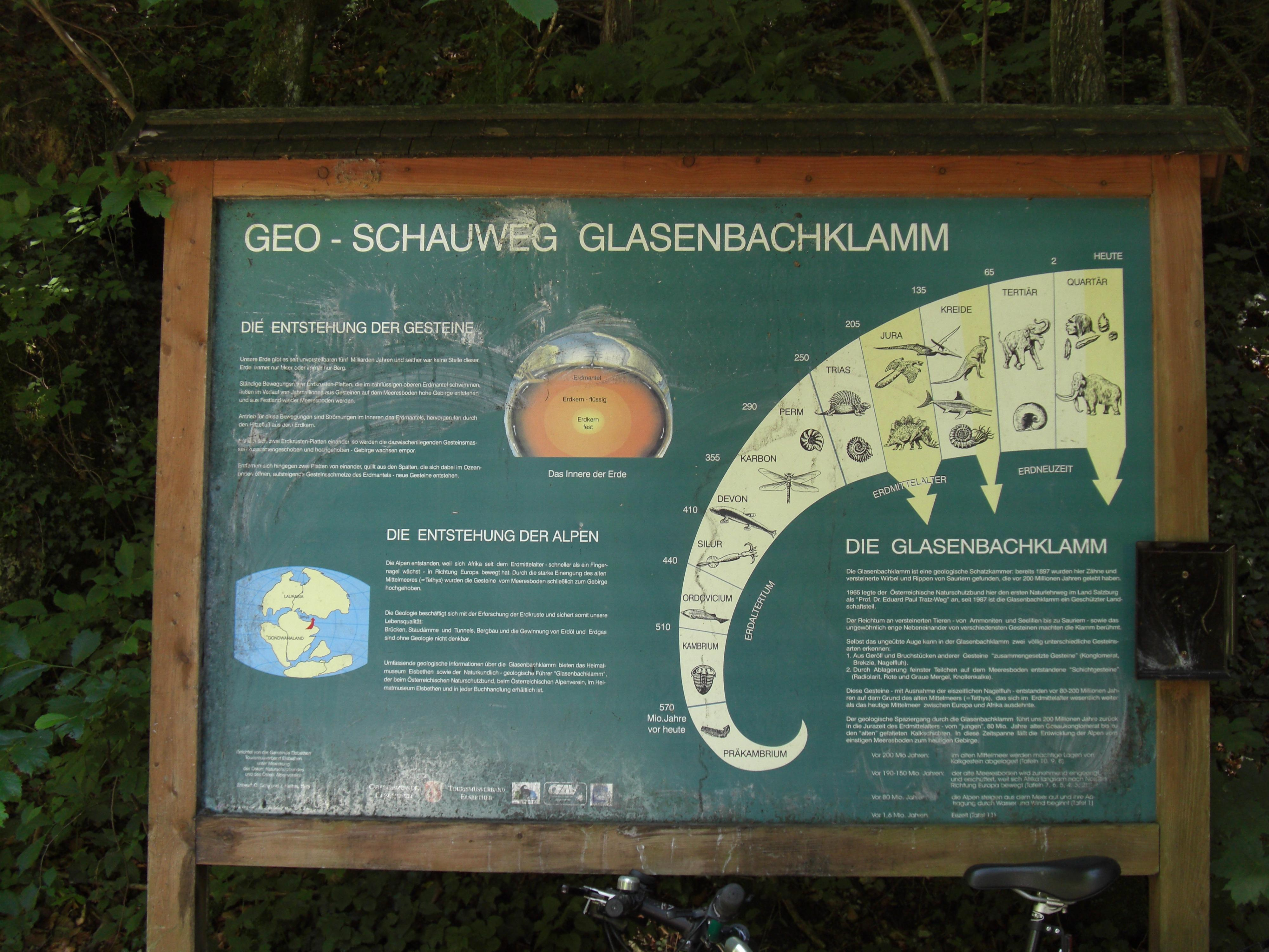 Schild des Geo Schauweges der Glasenbachklamm